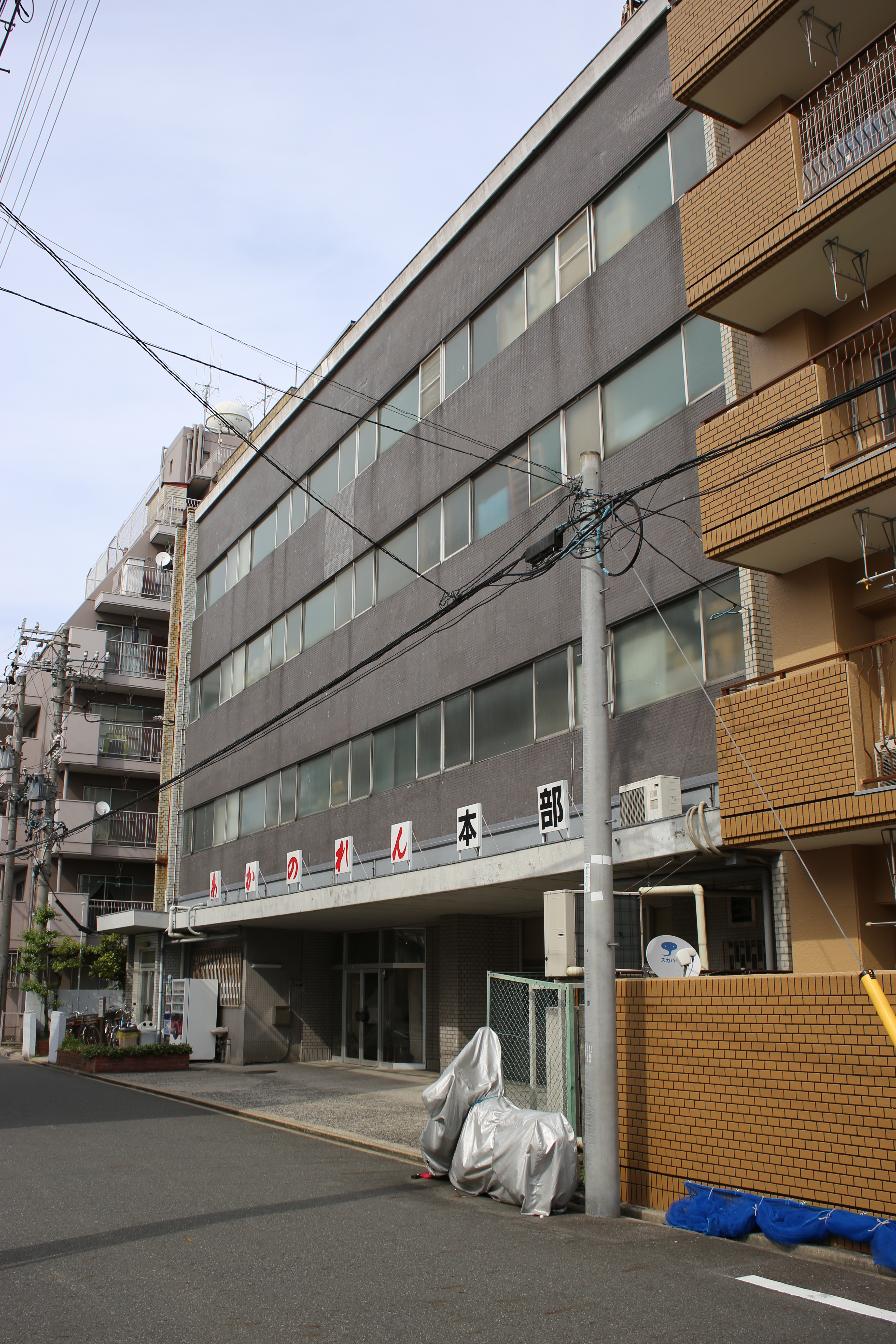 名古屋市南区明治一丁目のあかのれん本部を西側公道南側より撮影